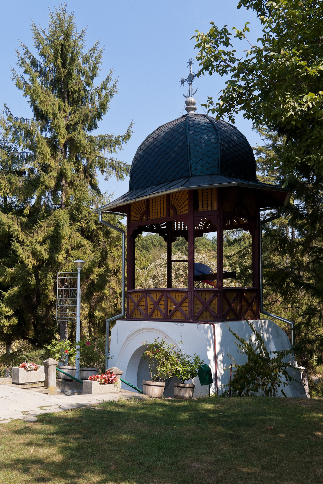 Fotografia prezinta turnul din incinta Schitului Trivale, vazut dinspre S. 03